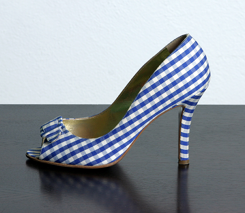 Flamenco-Pumps